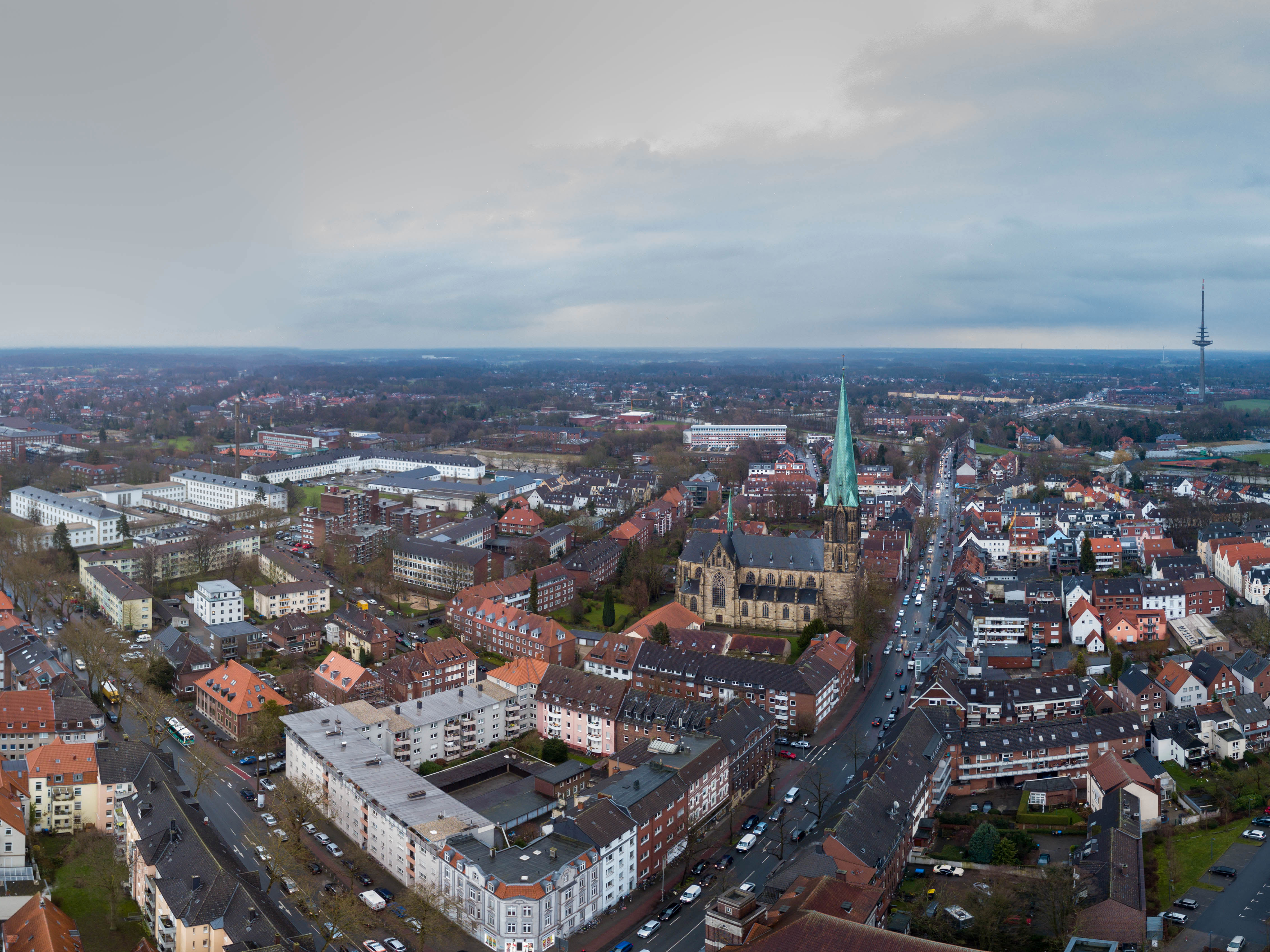 Luftaufnahme des Herz Jesu-Viertels von Münster (Westfalen) mit der Herz-Jesu-Kriche in der Bildmitte.